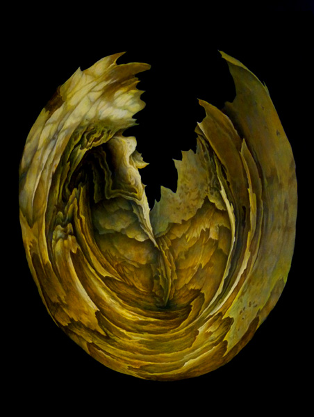 Antoni Kowalski, Drzewo żywota VI, olej, płótno, 130x97 cm, 2014, Antoni Kowalski, Tree of life VI, oil, canvas, 130x97 cm, 2014 Antoni Kowalski, Le bois de la vie VI, huile, toile, 130x97 cm, 2014